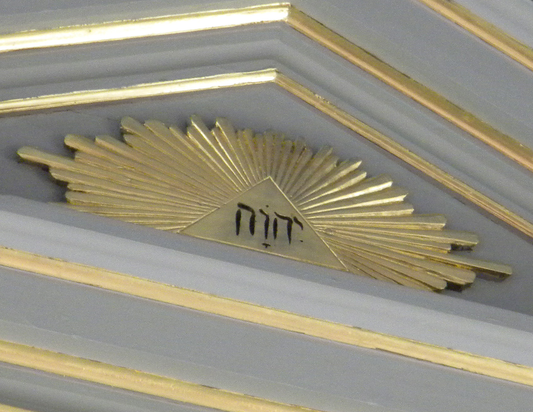 Altarkrön med tetragrammet JHWH Västerlösa kyrka